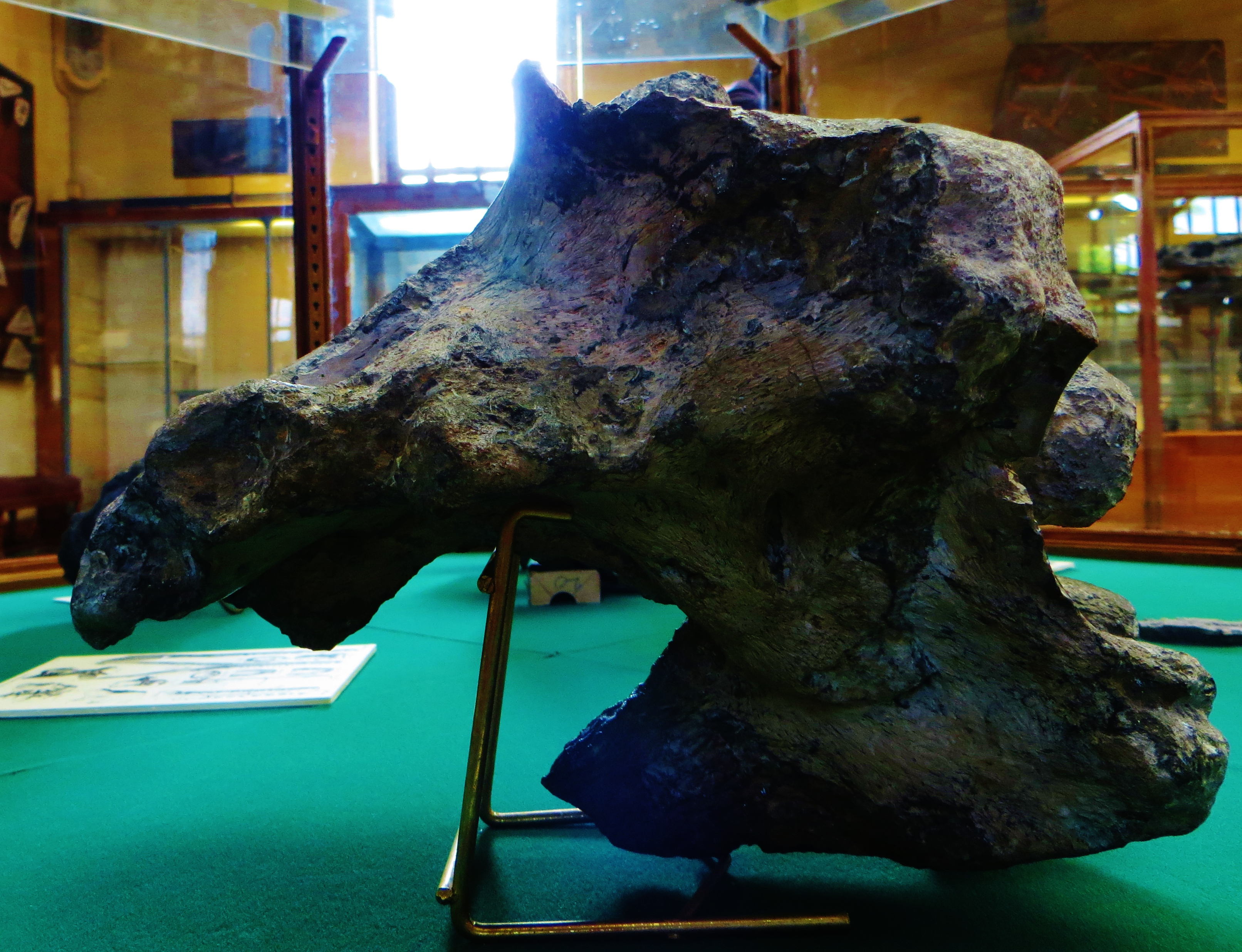 Fossil of Piveteausaurus, an extinct reptile- Took the photo at Musee d'Histoire Naturelle, Paris